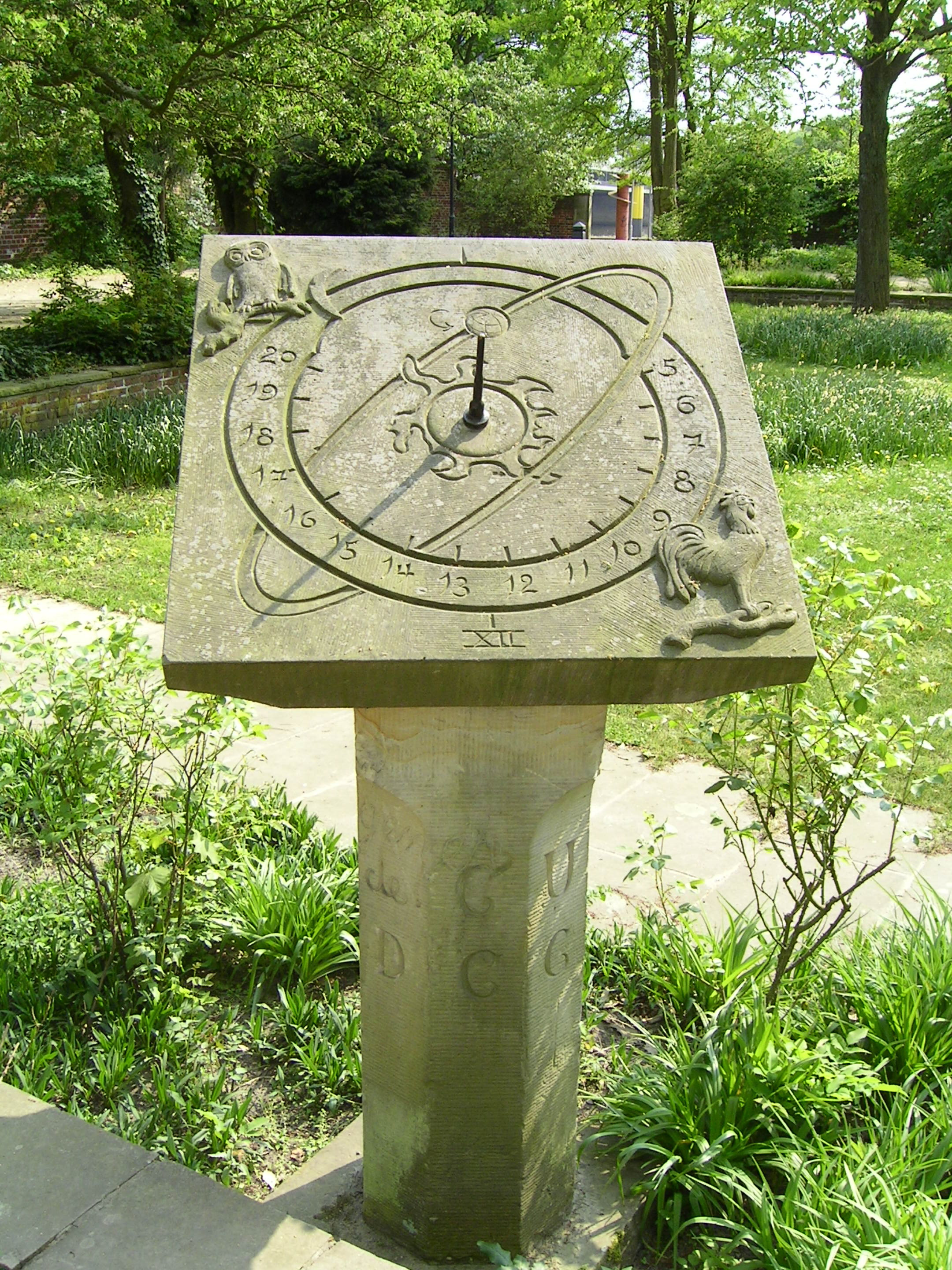 Rellotge de sol.